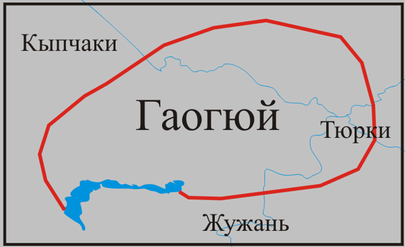 Карта телеутского государство Гаогюй